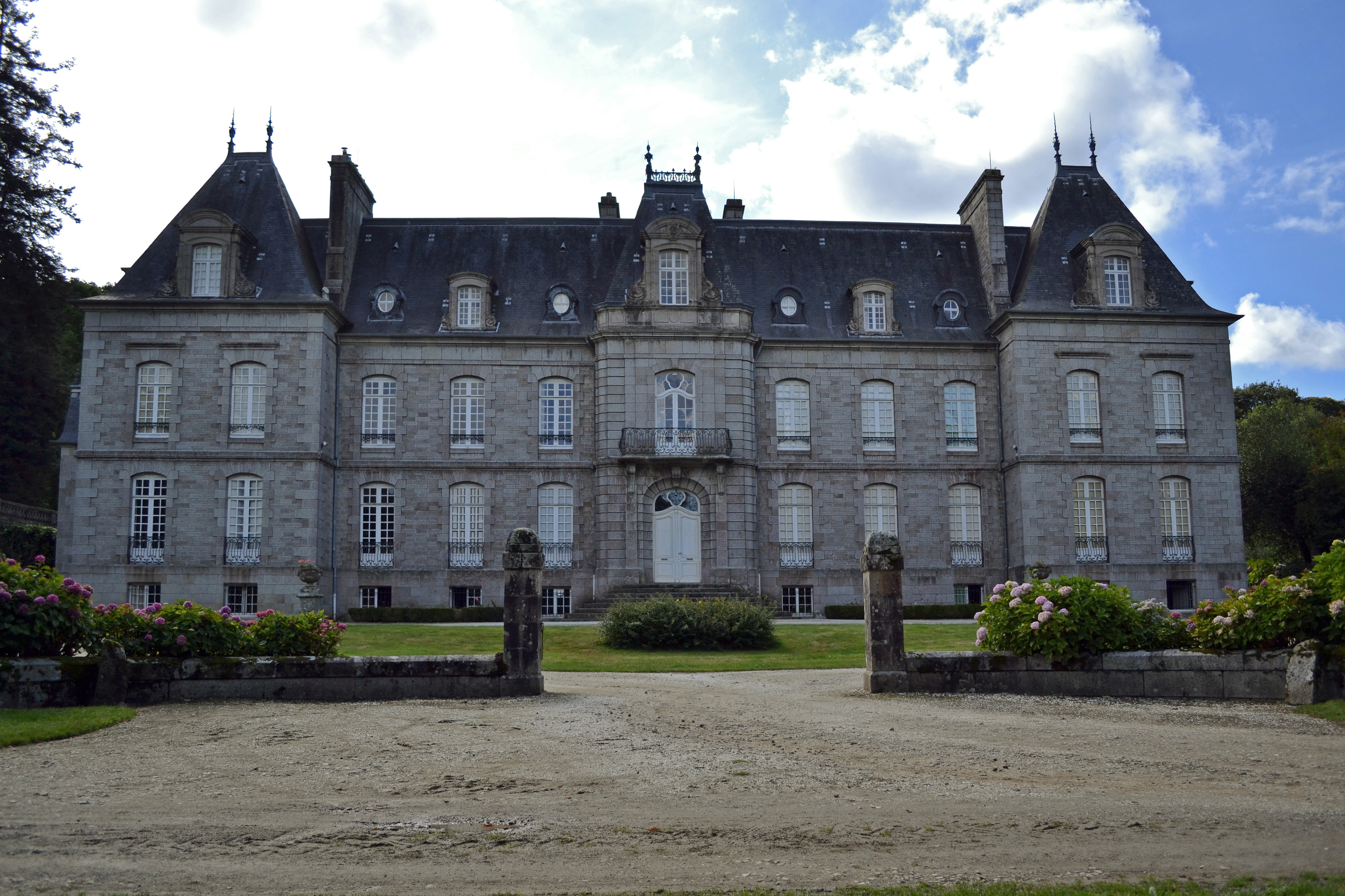 Château de Lesquiffiou du XVIIe siècle à Pleyber-Christ (Finistère). .